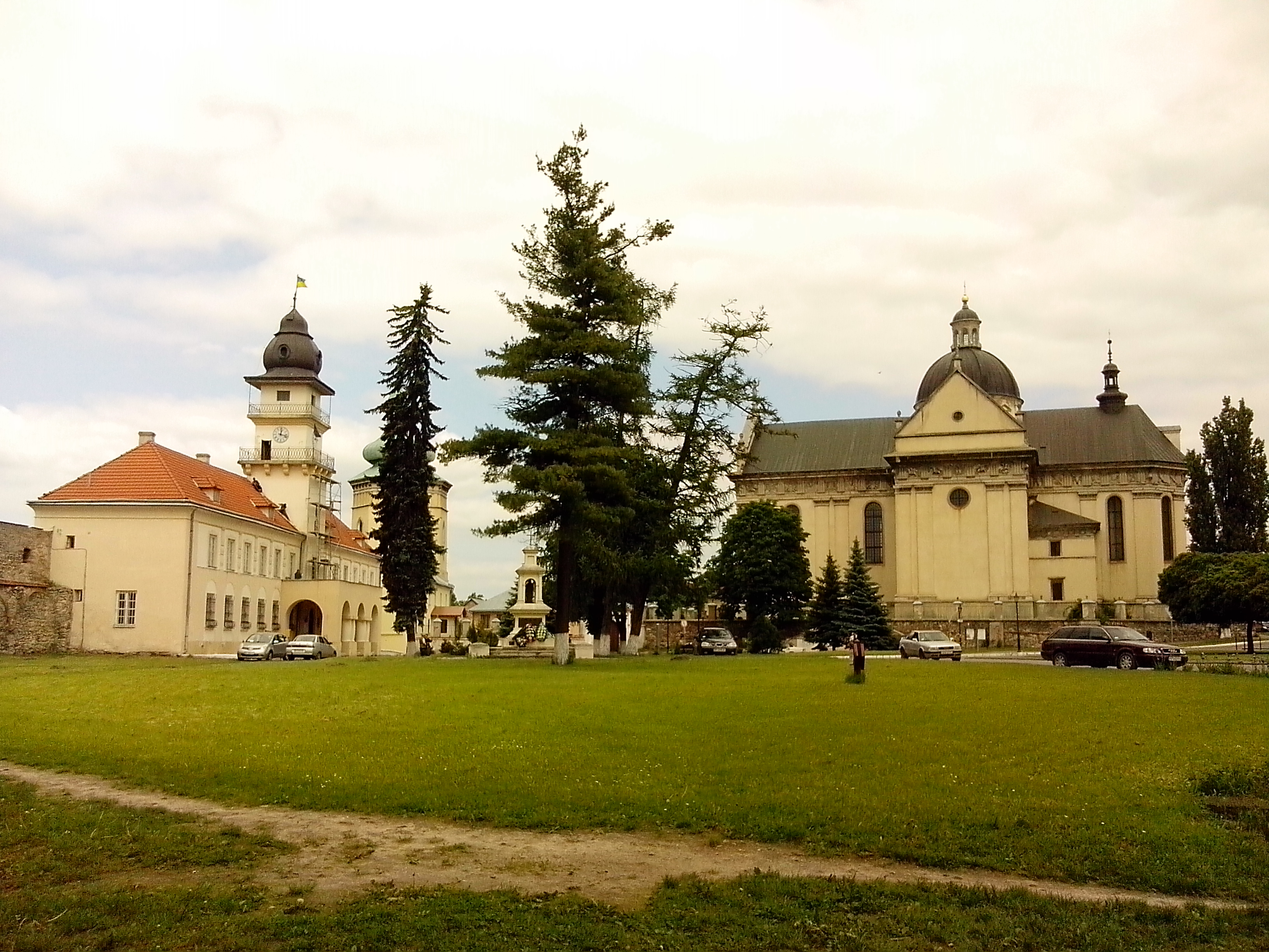 Замковий парк, Жовківський р-н м. Жовква